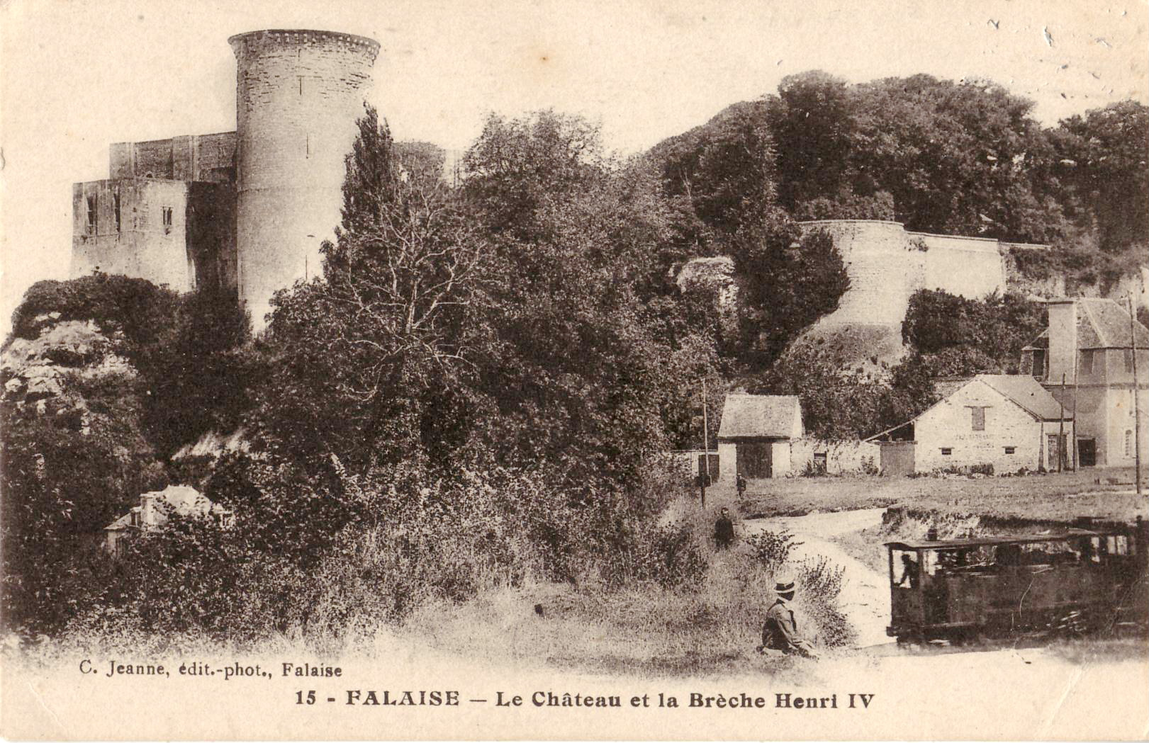 Carte postale éditée par C. Jeanne, édit.-phot. à Falaise, n°15 :FALAISE - Le Château et la Brèche Henri-IV